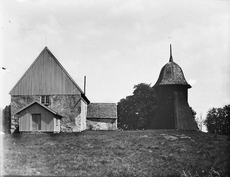 Kyrkan och klockstapeln från väster.